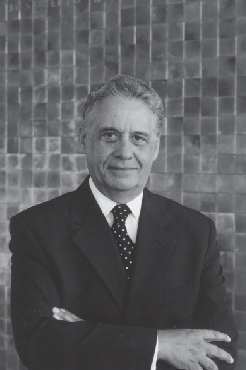 FHC como presidente em segubdo mandato